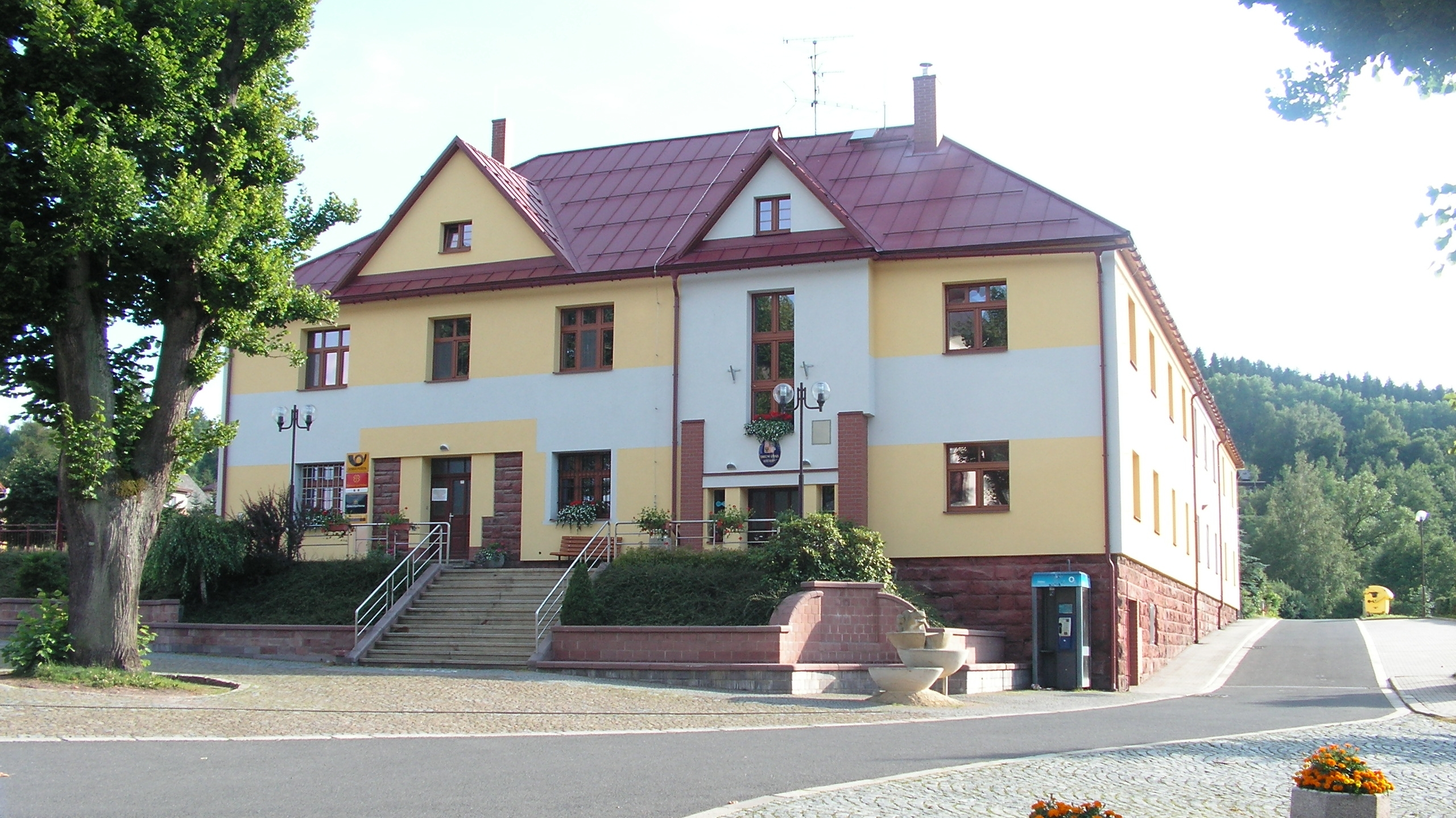 Budova Obecního úřadu Košťálov po zateplení.